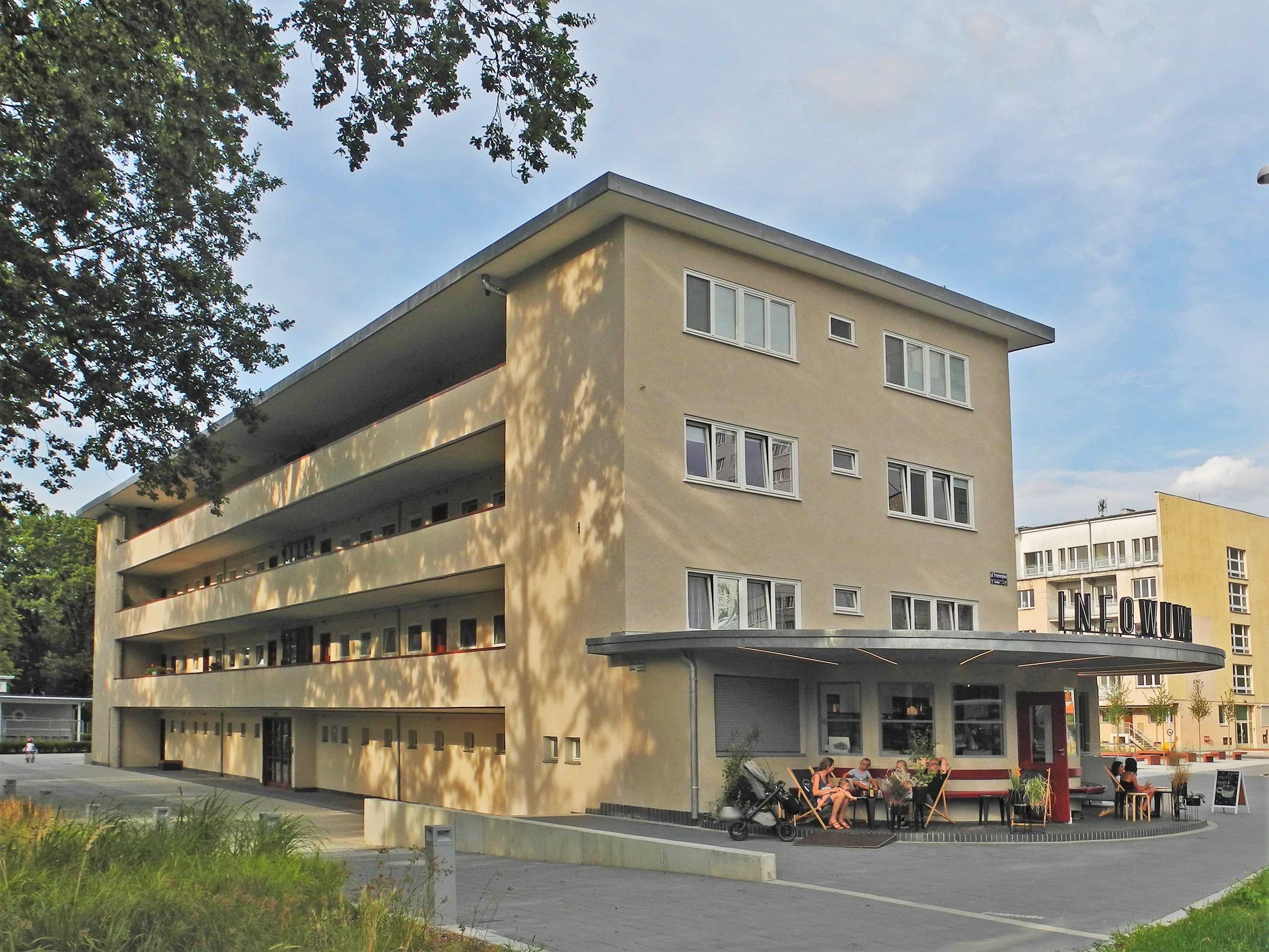 Werkbundsiedlung in Breslau. Wohnhäuser, errichtet 1929 anlässlich der Werkbundausstellung Wohnung und Werkraum (WuWa): Laubenganghaus von Paul Heim (1879–1963) und Albert Kempter (1863–1941) in Breslau – Wrocław, Tramwajowa 1